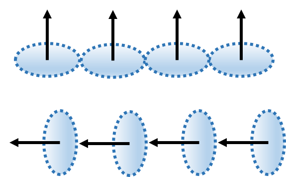 Ovaalid kujutavad orbitaalmomente ja nooled elektonide spinnide magnetmomendid. Üleval on kujutatud olukord, kus magnetmomendid on joondunud kerge telje suunas. All on olukord, kus spinnide magnetmomendid on reorienteeritud.